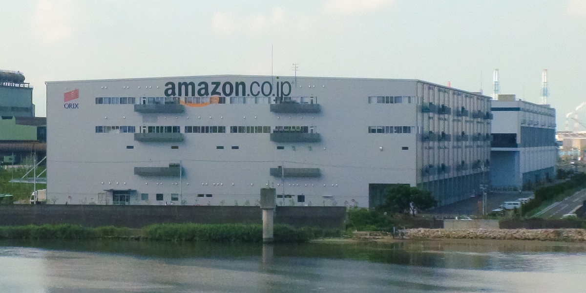 アマゾン堺FC （堺市堺区築港八幡町）